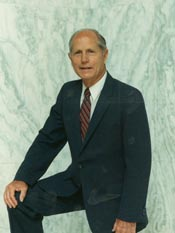 Representative Glenn M. Anderson.